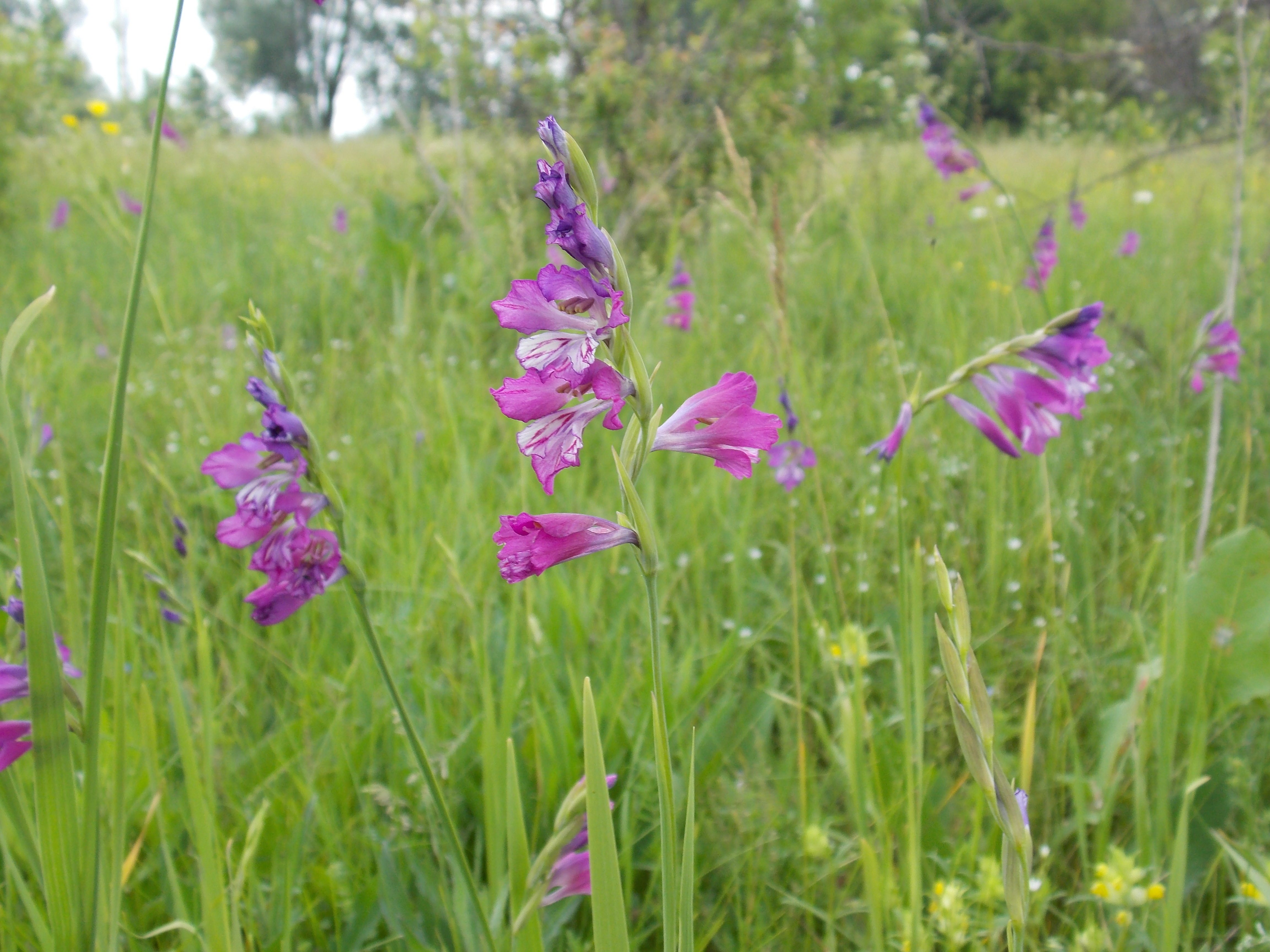 Садочки, Котелевський р-н, с. Діброва